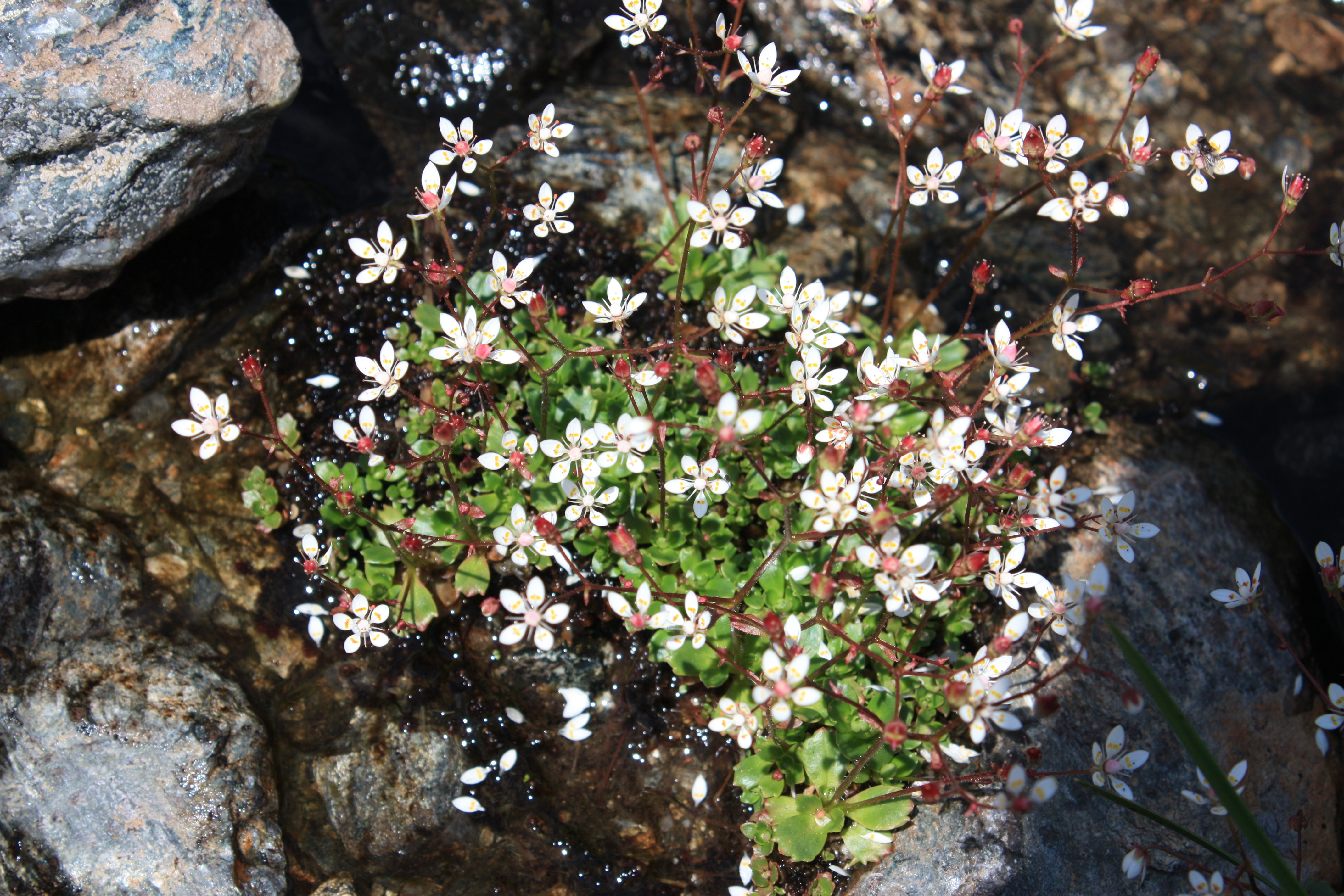 Saxifraga stellaris, Habitat: In der Kirschen, Kreuzeckgruppe, Carinthia, Austria